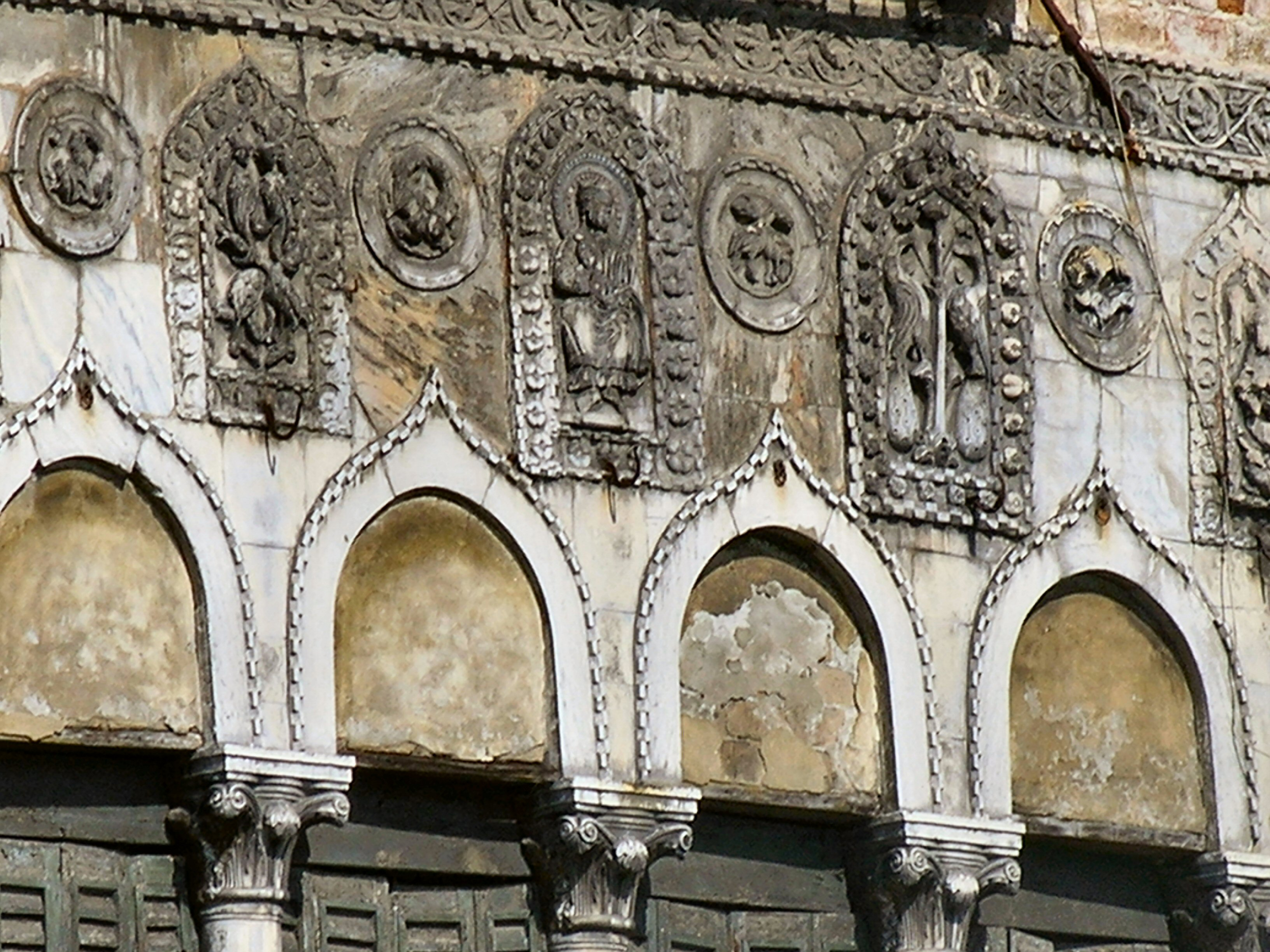 Reliefs an der Ca' da Mosto in Venedig. Byzantinisch-venezianischer Stil